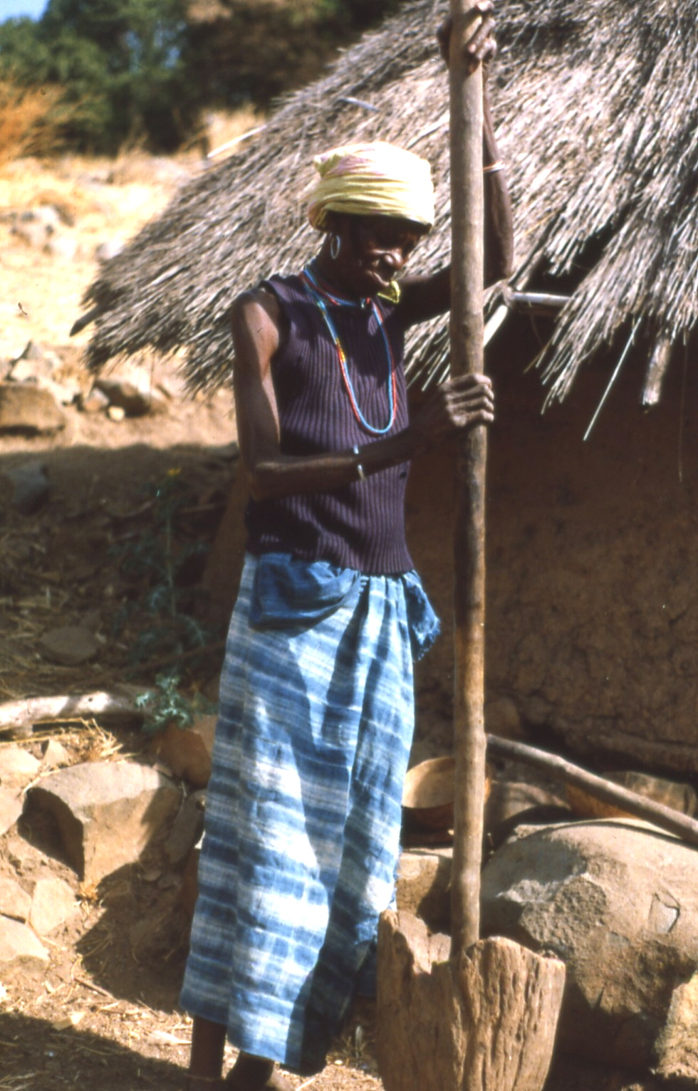 Bedik woman at Iwol, Senegal